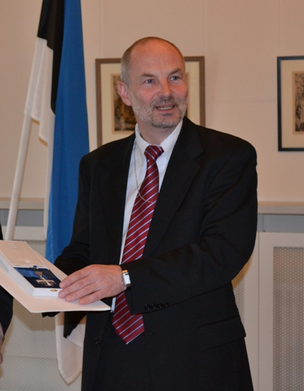 Sven Jürgenson suursaadikuna riiklikku teenetemärki üle andmas